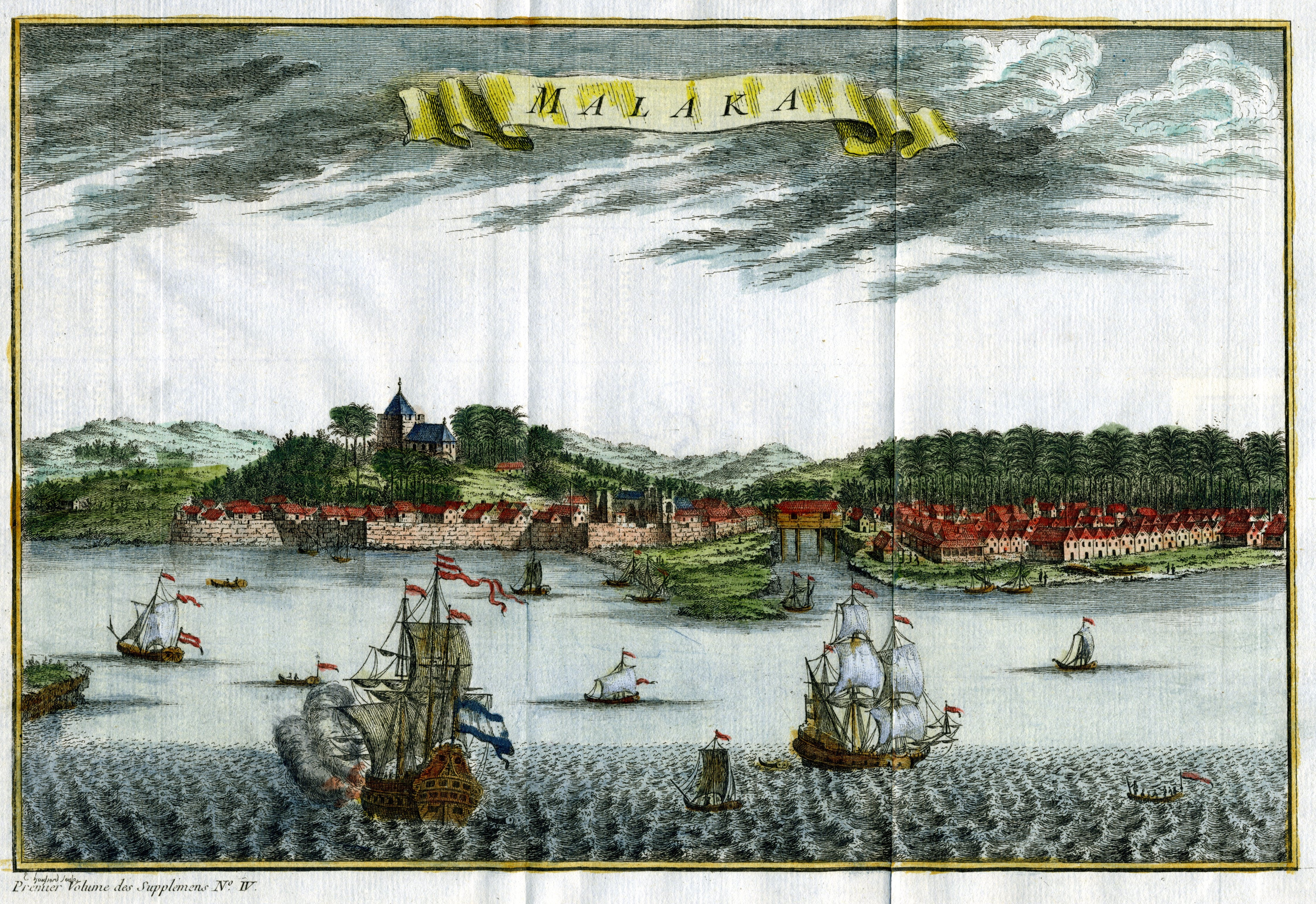 Histoire_générale_des_voyages,_Paris,_Didot,_1750, premier_volume_des_supplémens_n°4,_gravure_couleur